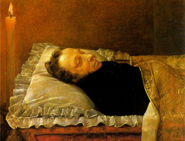 Козлов Александр Алексеевич (1818-1884). Пушкин на смертном одре. 1837. Холст, масло, 44х57 А.А. Козлов приехал на Мойку вместе с Ф.А. Бруни и сделал эскизы. Позже по этим эскизам Козлов закончил рисунок «Пушкин на смертном одре», а затем картину, которая находилась у П.А. Вяземского и хранилась в Остафьеве. Всероссийский музей А.С. Пушкина Идентификационный номерКП-592 Ж-19